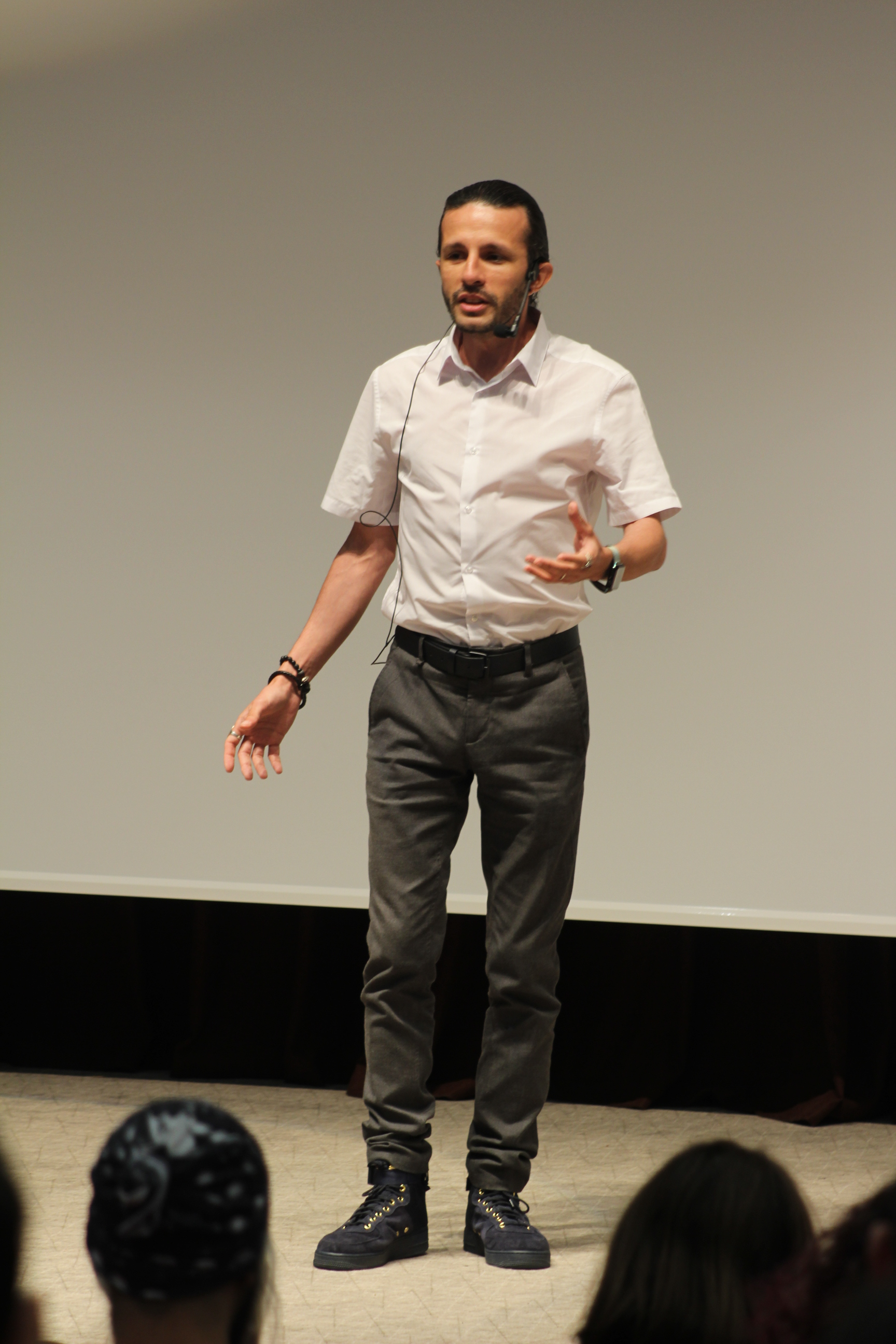 Harun Can, Türk seslendirme sanatçısı, Akdeniz Üniversitesi'ndeki söyleşisinde.